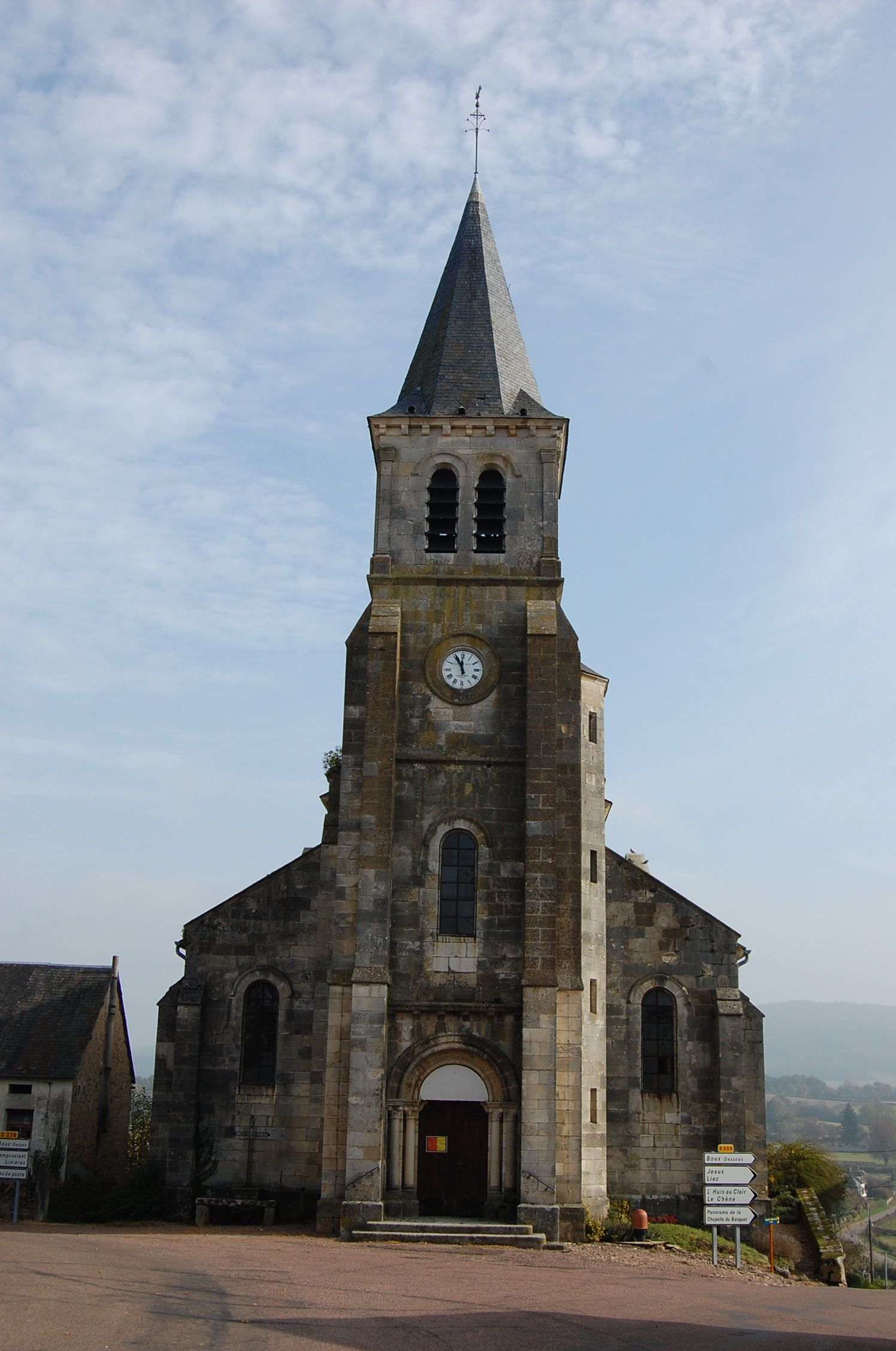 état actuel, église, Mhère